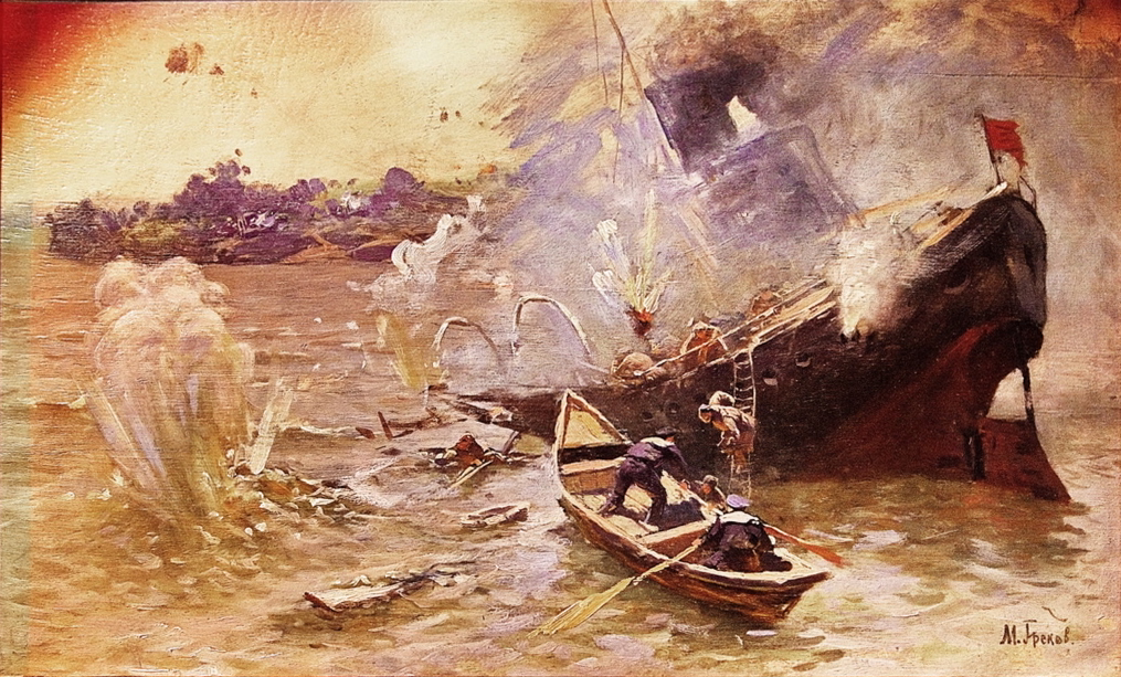 Гибель парохода «Ваня-коммунист». Экспозиция Центрального музея Вооружённых Сил. Холст, масло